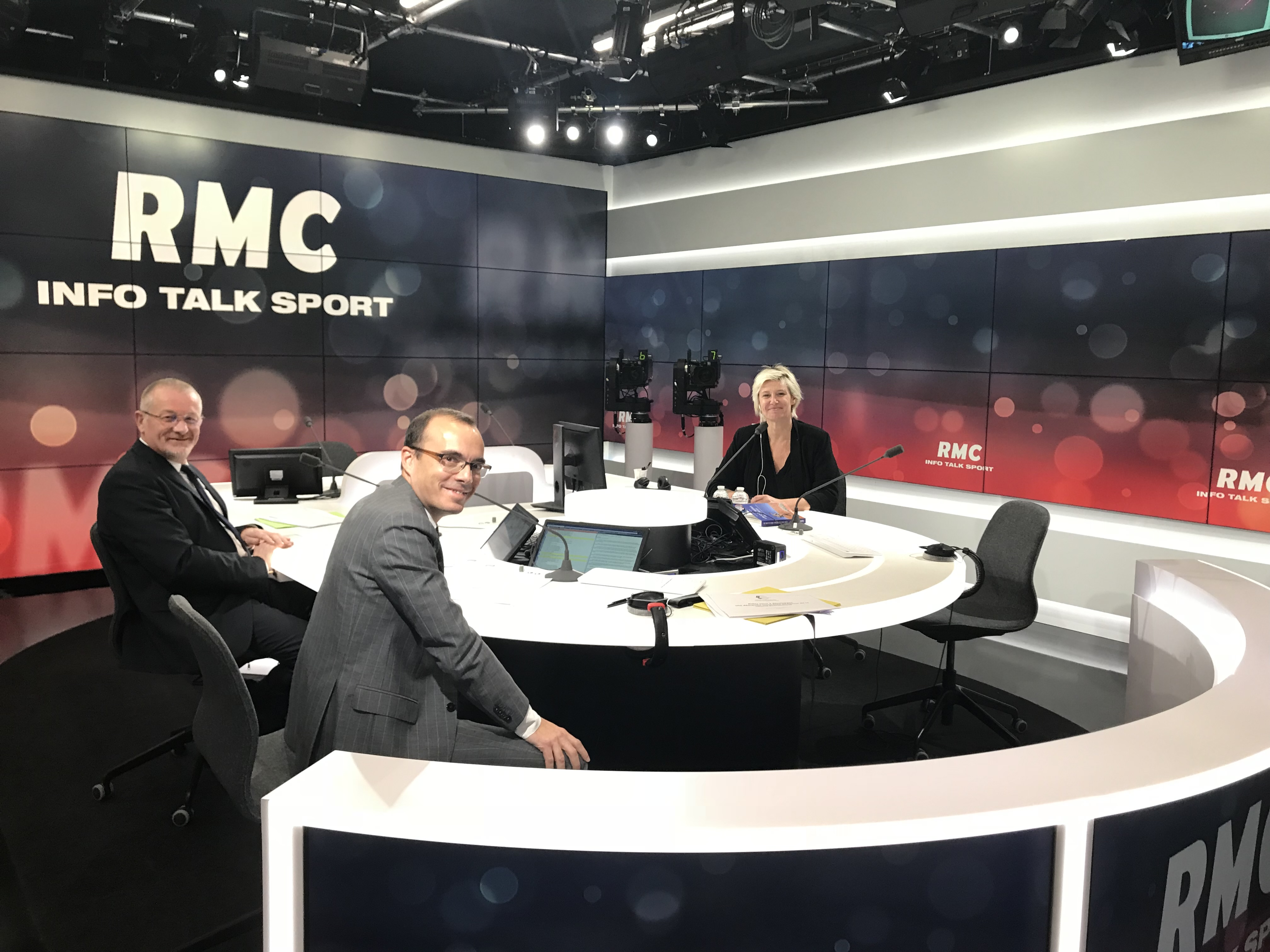 Eric GIRARDIN député de la Marne - RMC